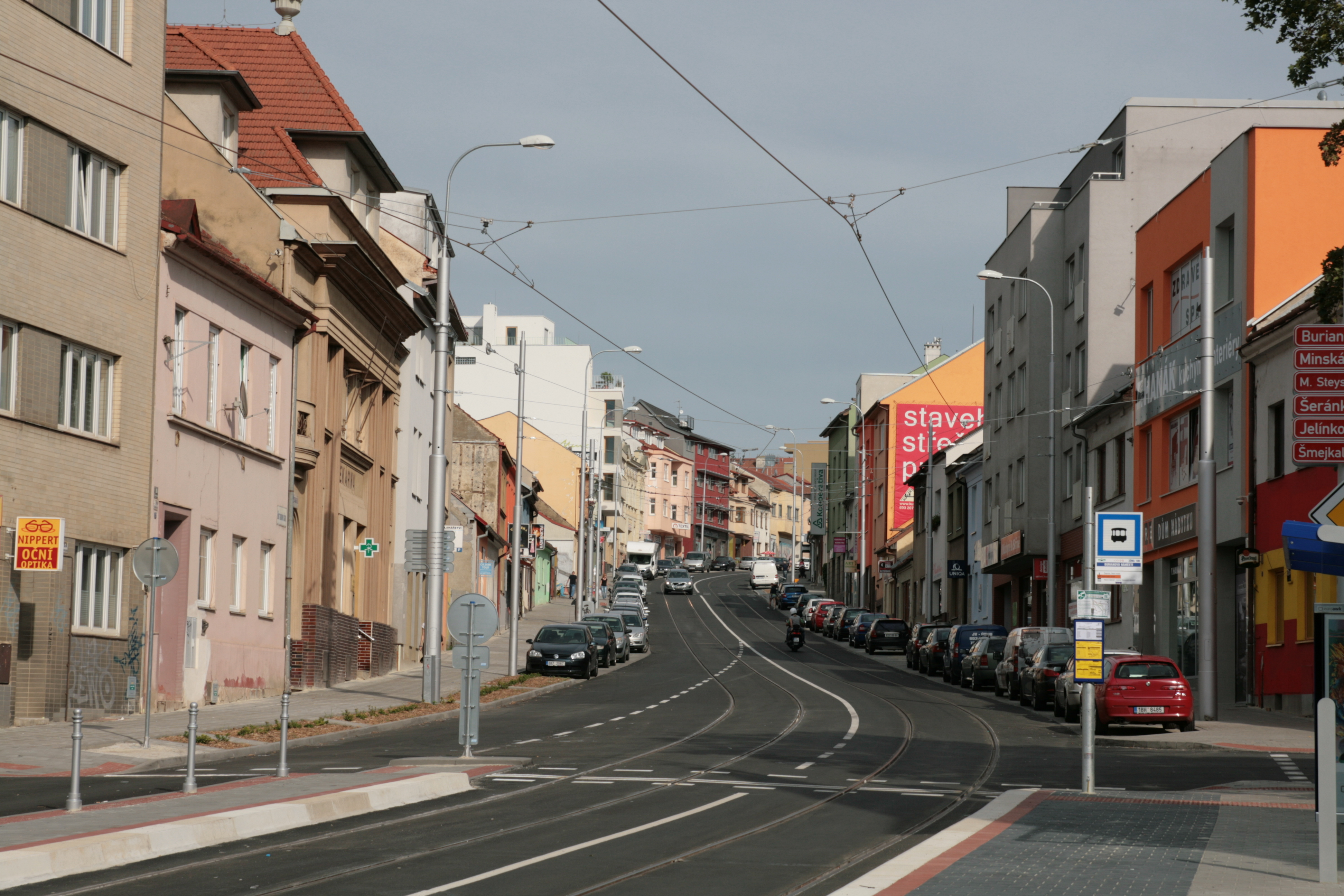 Ulice Minská v Brně-Žabovřeskách. V popředí zastávka MHD Burianovo náměstí. První den ostrého provozu po rekonstrukci.